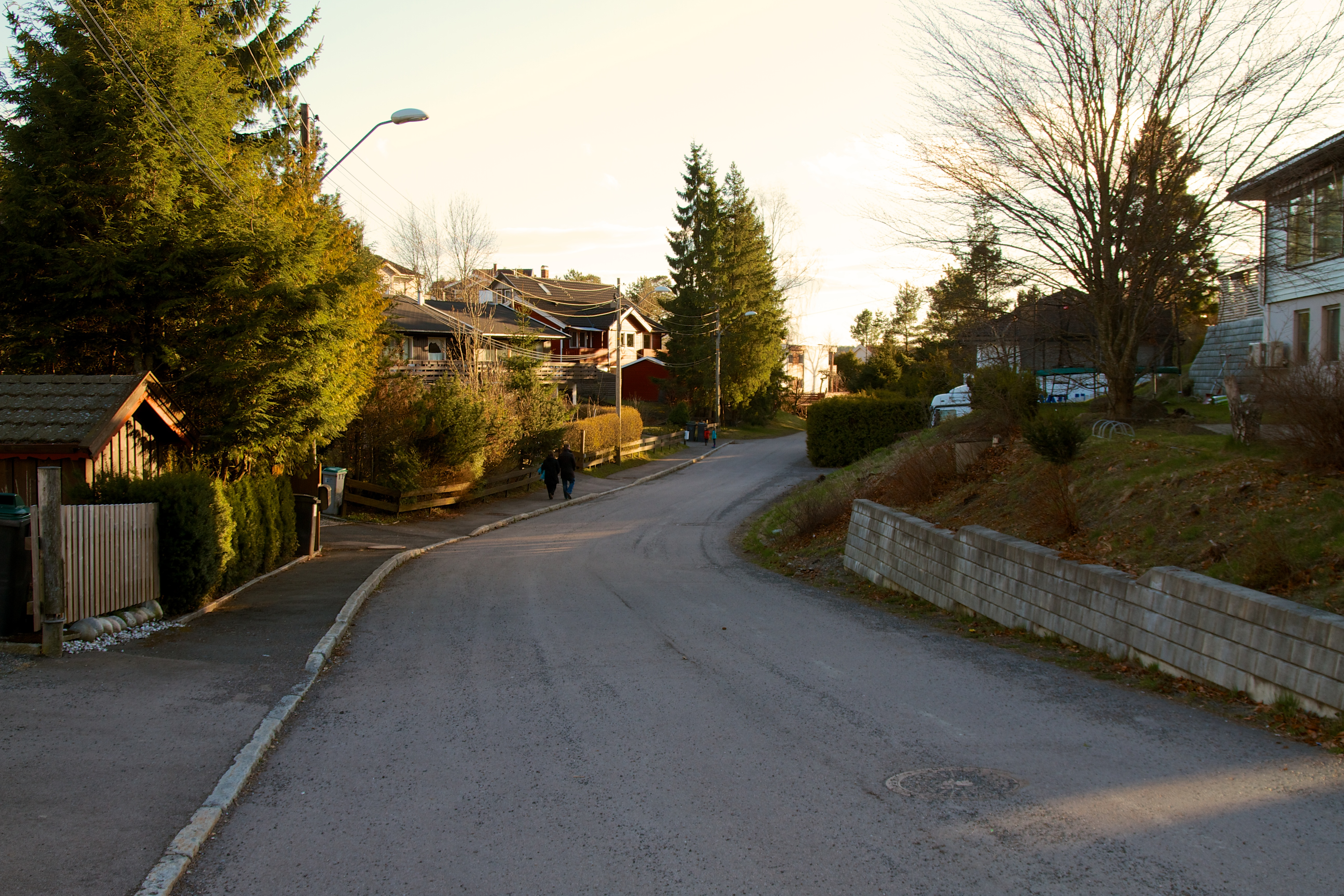 Aagots vei på Ulsrud i Oslo.